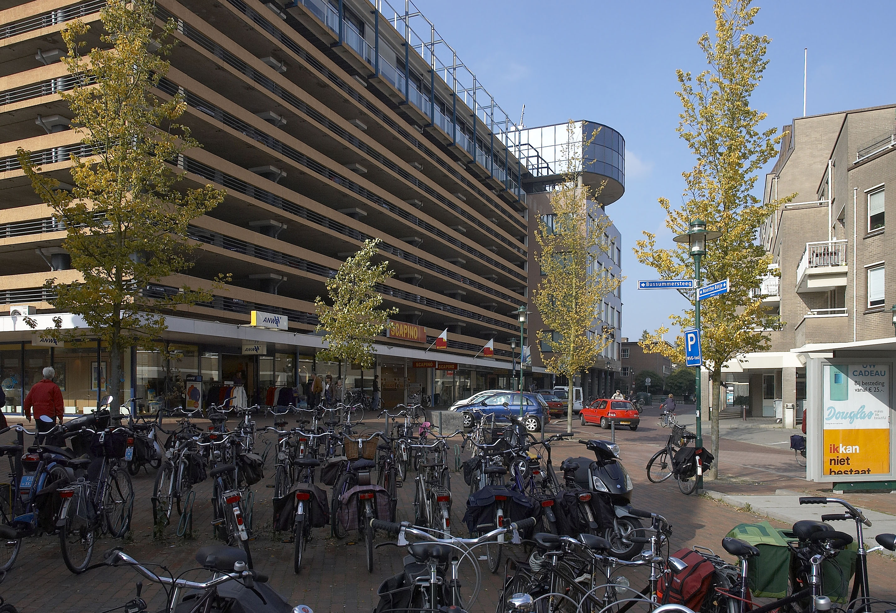 Parkeergarage en winkels bij Noordse Bosje, Hilversum